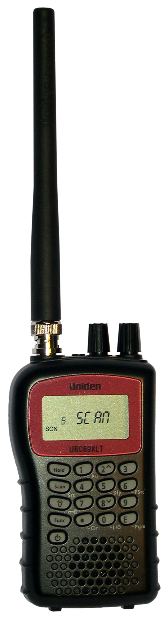 Handheld Scanner - Funkhandscanner von Uniden